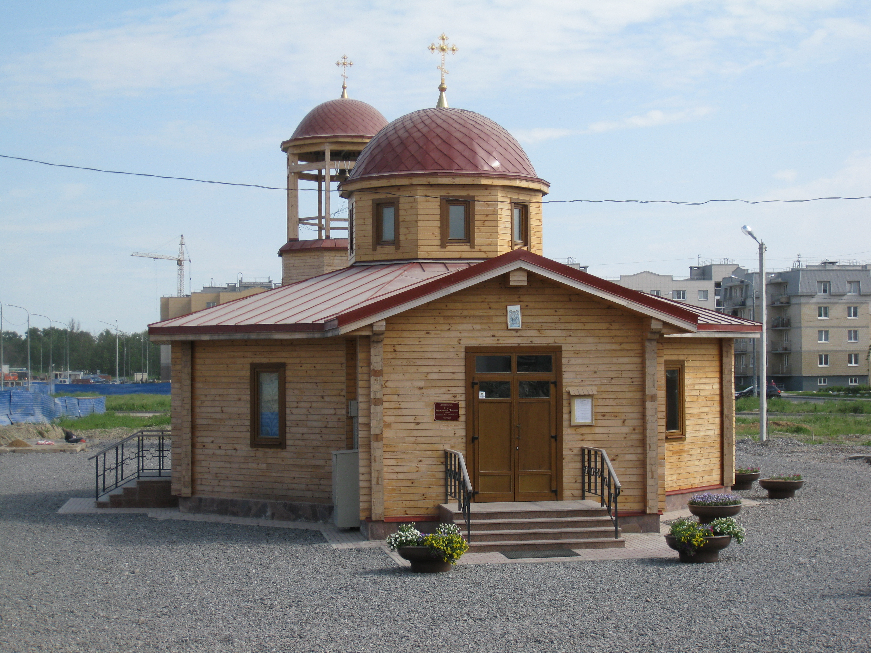 Часовня Архангела Михаила в микрорайоне Славянка (пос. Шушары)